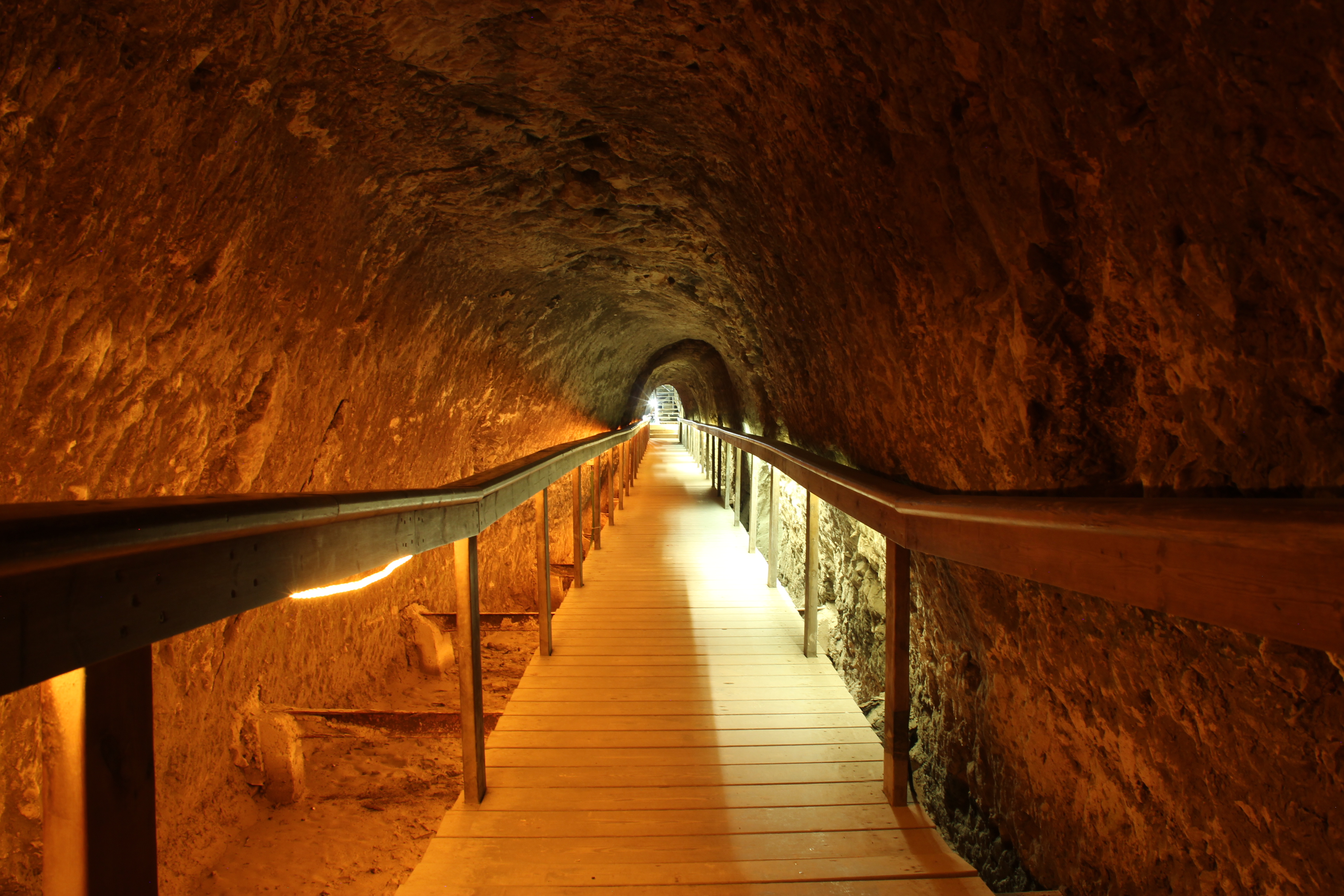 תל מגידו (ערבית تل المتسلم תל אל-מֻתַסַלִם - "תל המושלים") הוא מהחשובים ומהמרשימים באתריה הארכאולוגיים של ישראל. ראשית ההתיישבות בו החלה באלף הרביעי לפנה"ס. בשנת 2005 הוכר האתר כאתר מורשת עולמית על ידי אונסק"ו.